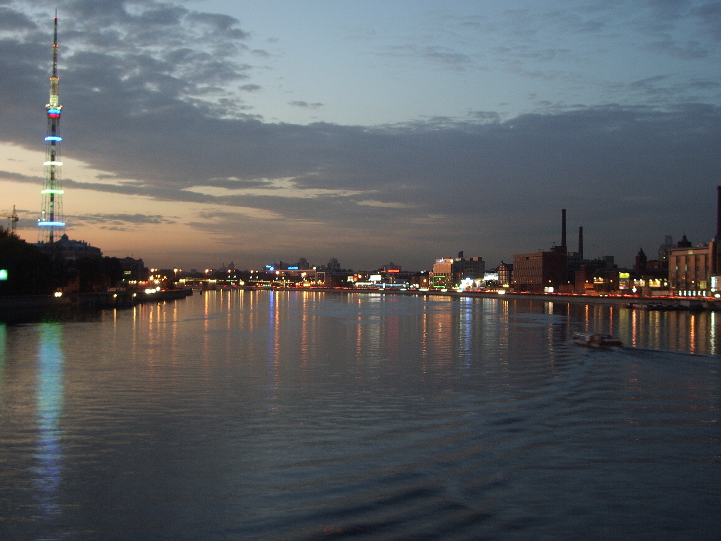 Большая Невка, вид с Гренадерского моста. Сентябрь 2006 г.